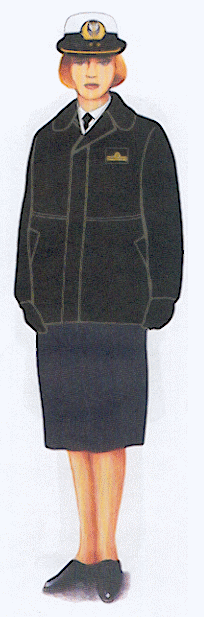 Rysunek ten pochodzi z załącznika do rozporządzenia ministra obrony narodowej z dnia 2 grudnia 2004 r. w sprawie wzorów oraz noszenia umundurowania i oznak wojskowych przez żołnierzy zawodowych i kandydatów na żołnierzy zawodowych.